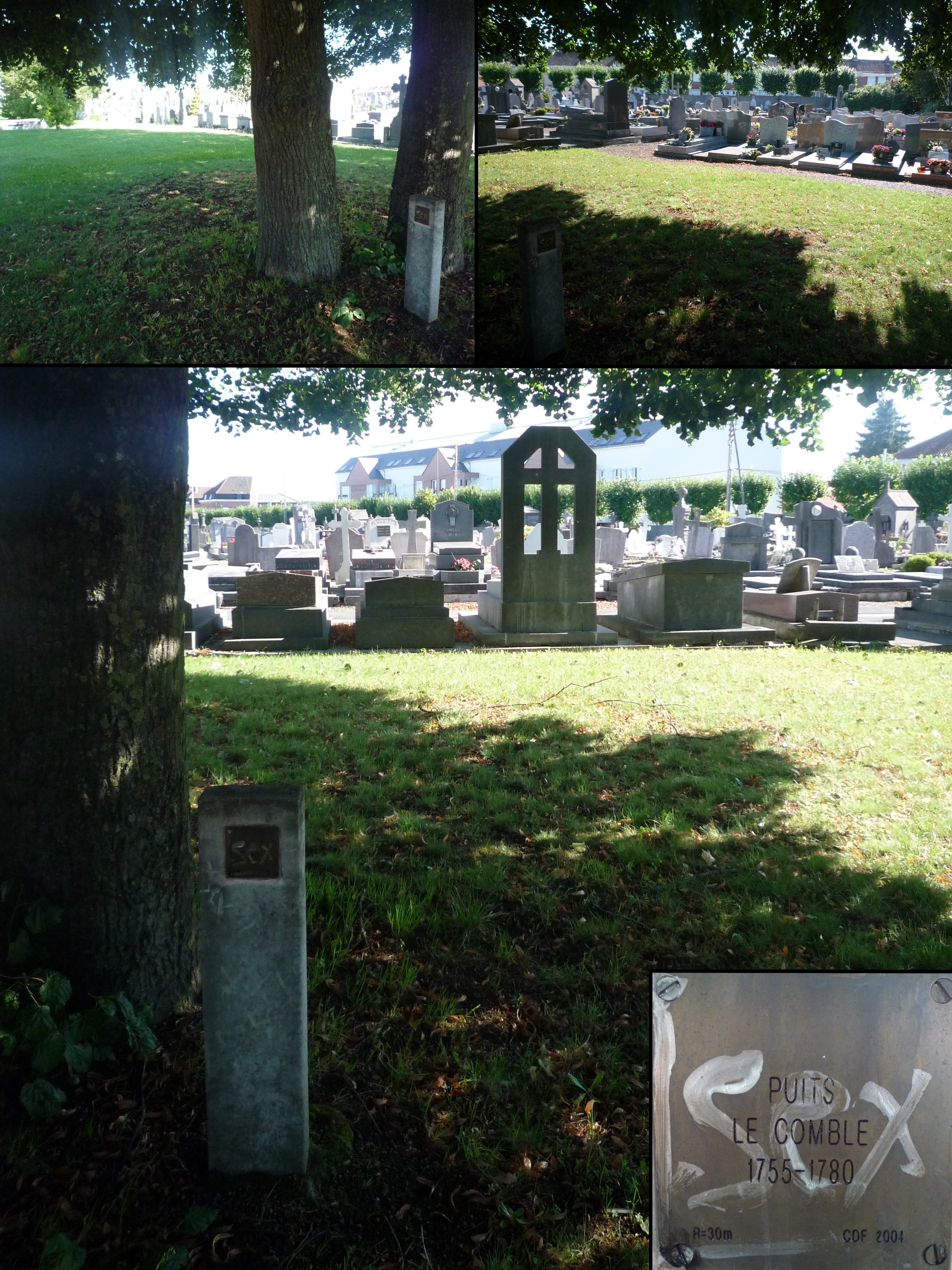 Puits Le Comble de la Compagnie des mines d'Anzin, Anzin, Nord, Nord-Pas-de-Calais, France.